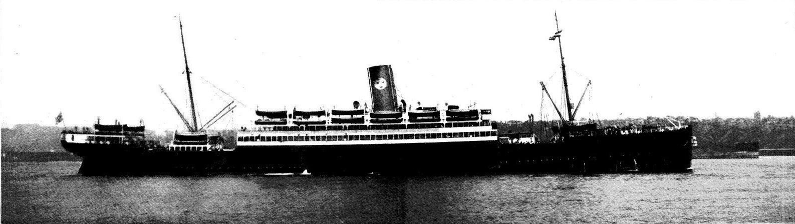 Svenska Amerika Liniens faryg S/S Drottningholm.